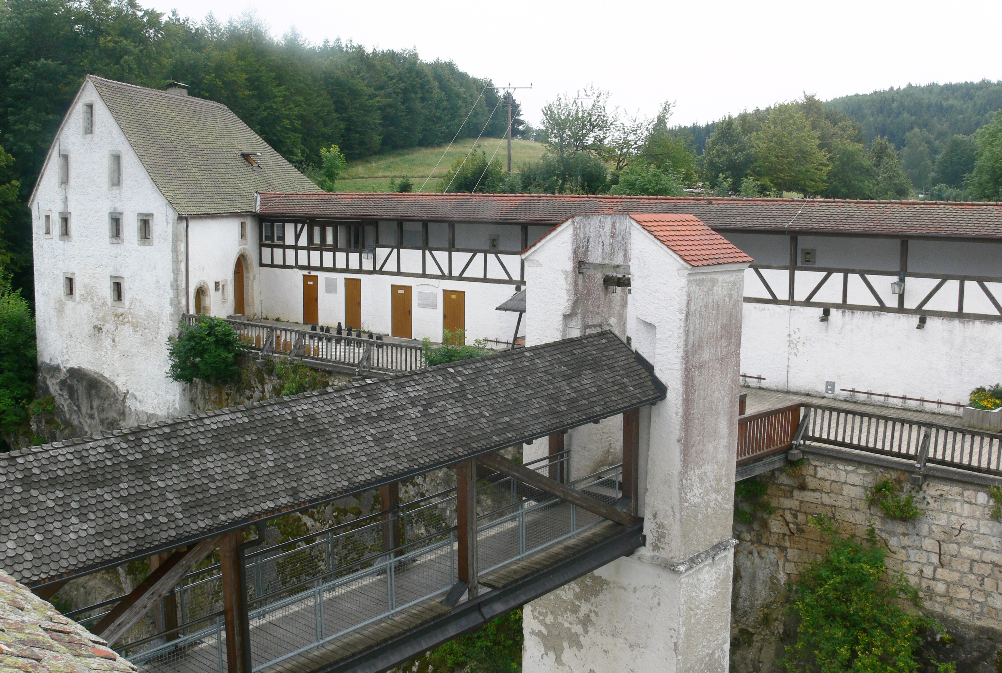 Burg Wildenstein bei Leibertingen Brücke über den Burggraben und die Vorburg (Wehrgang und Ostturm), von der Hauptburg aus gesehen